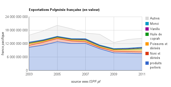 d'après données ISPF